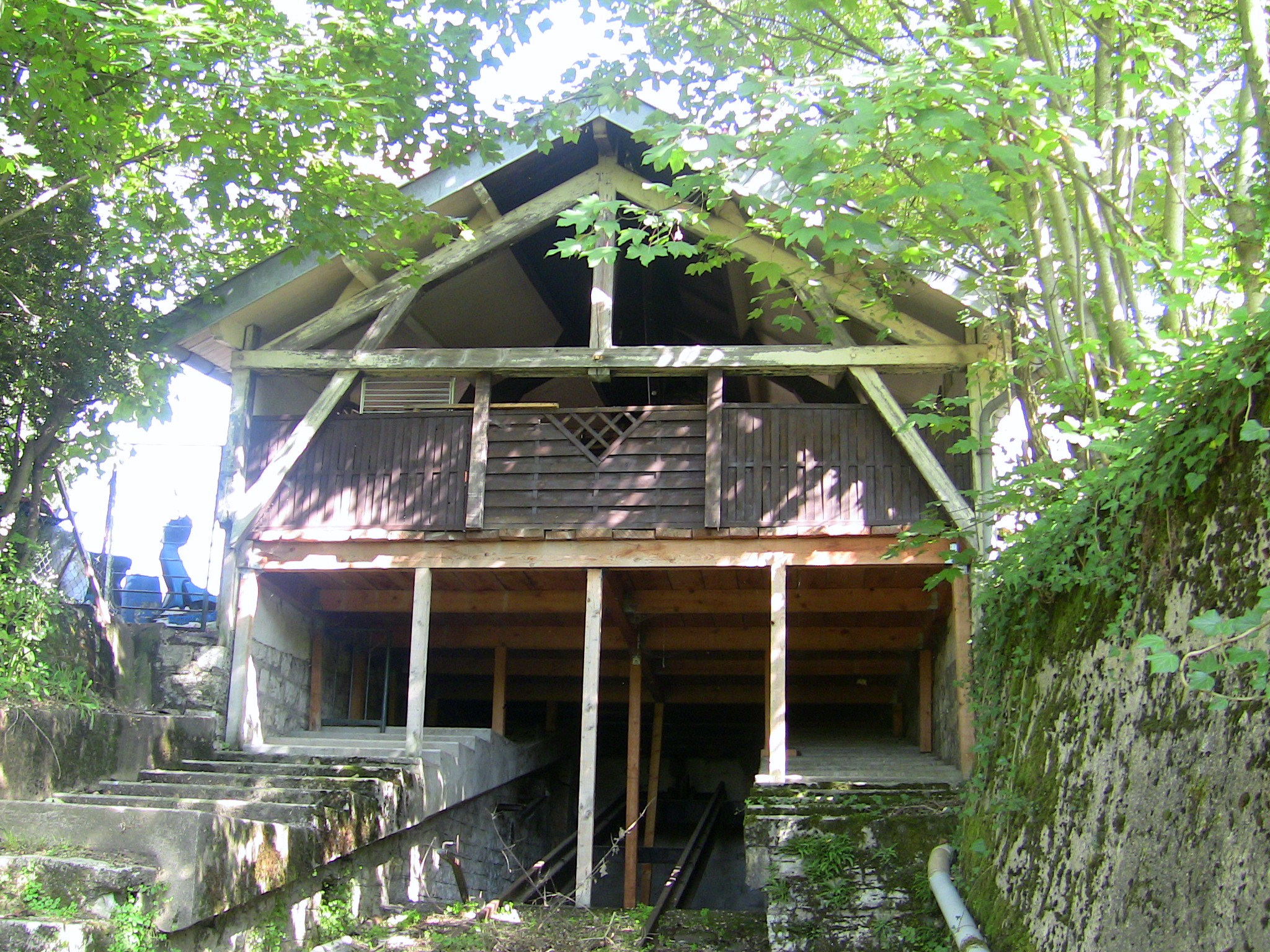 La gare haute du funiculaire de Bregille à Besançon (Doubs, France).